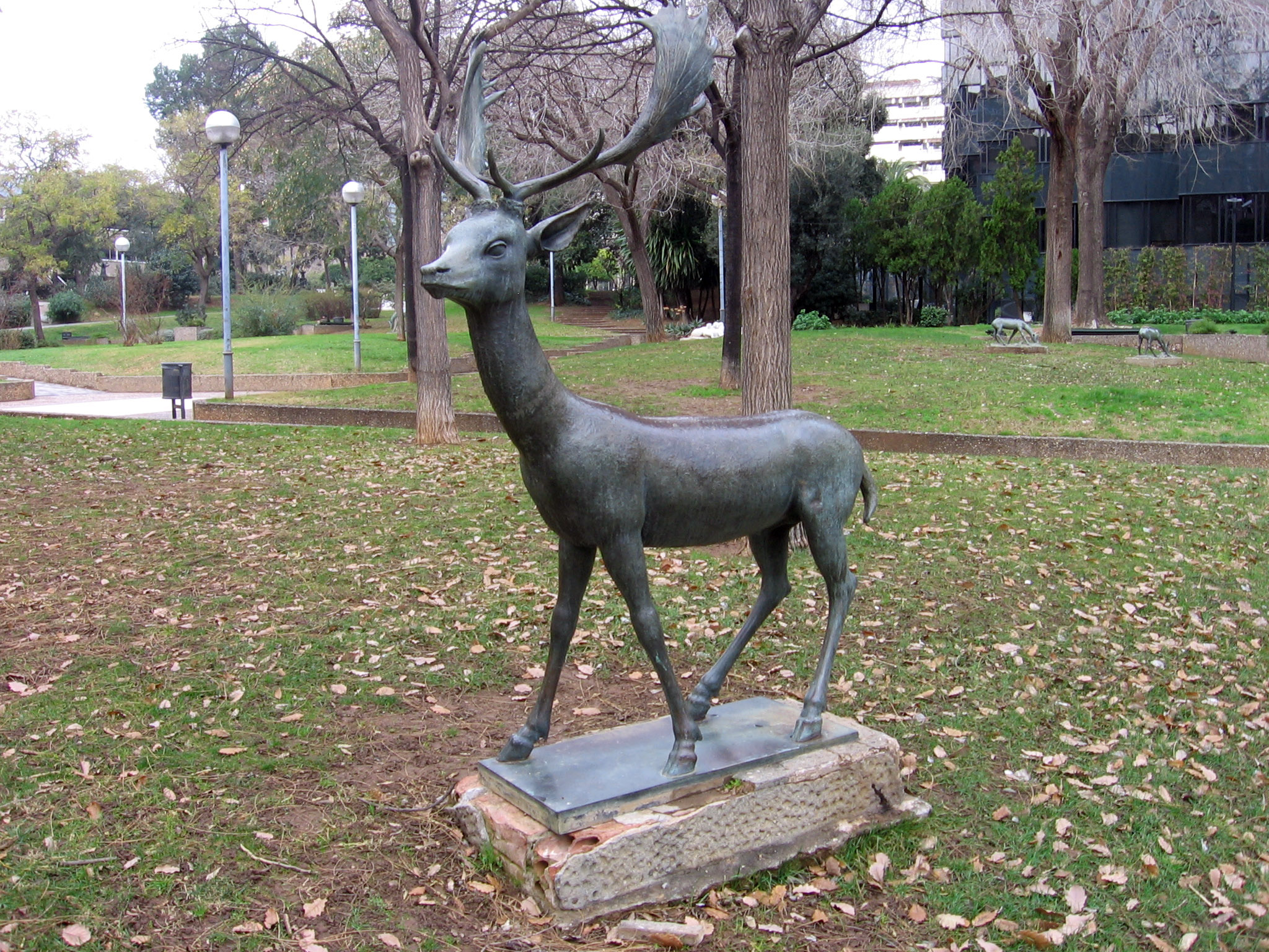 Conjunto de animales (Frederic Marès).